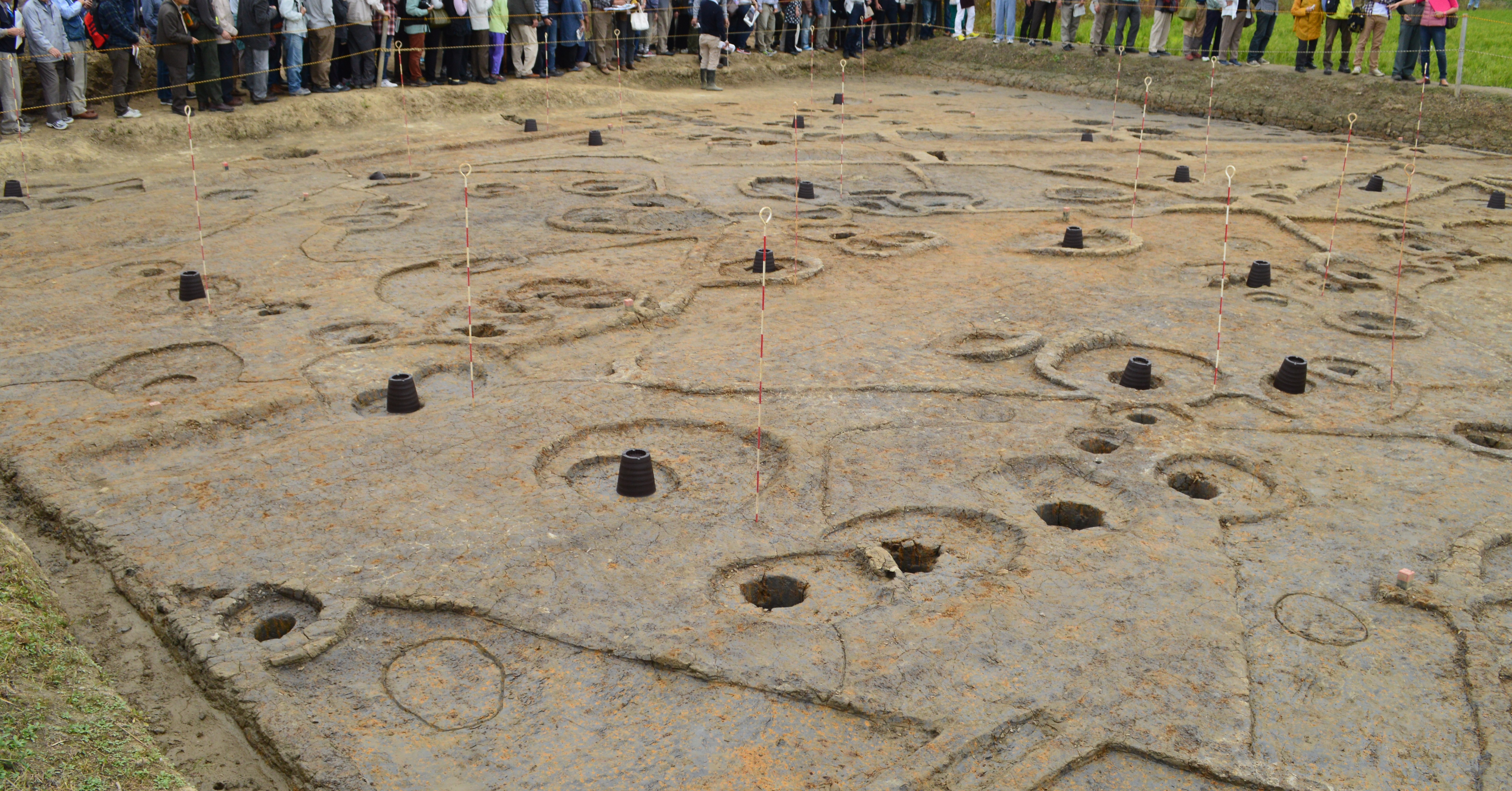 稲部遺跡 (2016年度発掘調査時)